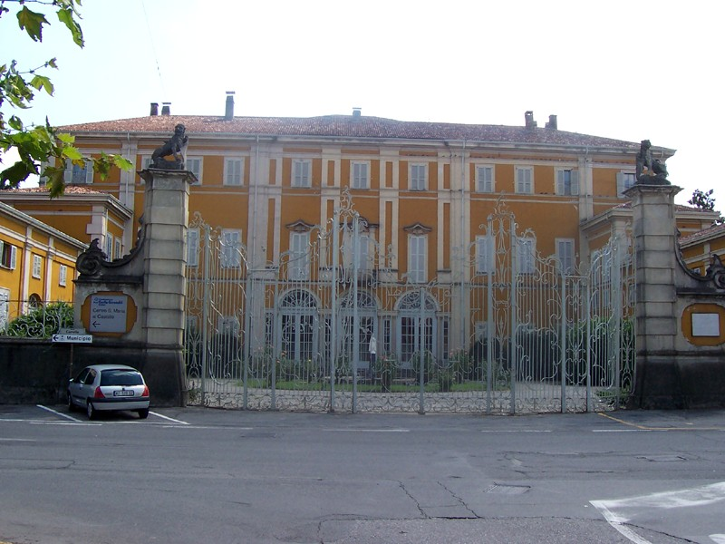 Pessano con Bornago - Villa Castiglioni